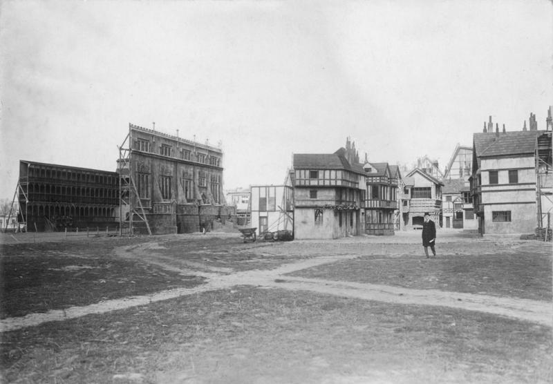 Scherl: Von der Filmstadt bei Tempelhof. Straßenfronten in der Filmstadt. ADN-ZB/Archiv Berlin 1920: Aufnahmegelände der Ufa in Tempelhof.